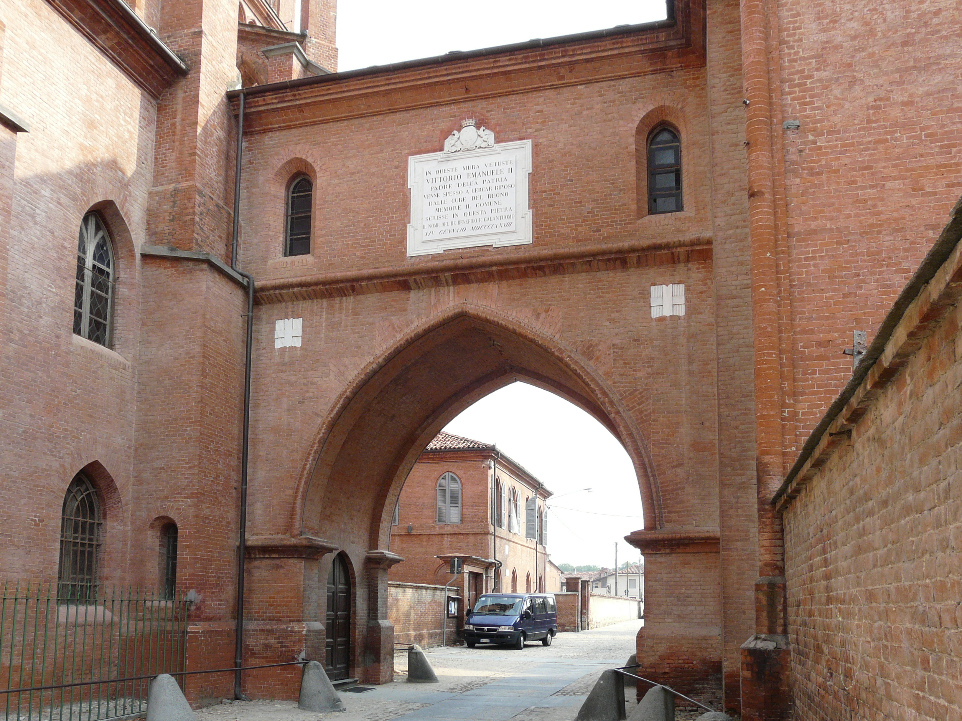 Porta d'accesso, Pollenzo, Comune di Bra, Piemonte, Italia